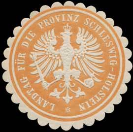 Sealing stamp Title: Landtag für die Provinz Schleswig-Holstein Description: ocker, weiß, geprägt Place: Kiel size: 4 cm